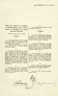 Originalunterschriften unter dem Gesetz vom 3.4.1919 betreffend die Landesverweisung der Habsburger